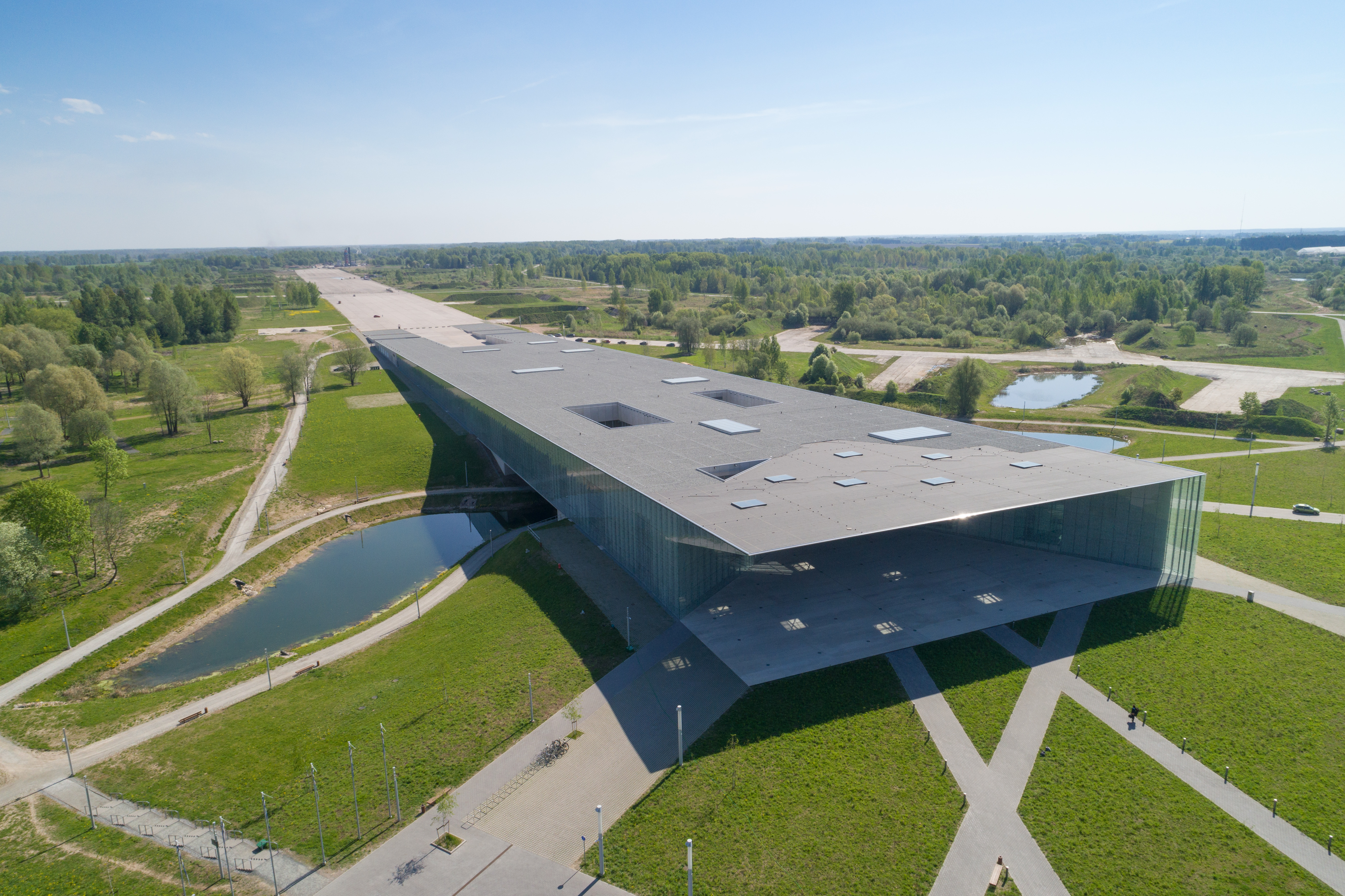 Eesti Rahva Muuseumi peahoone